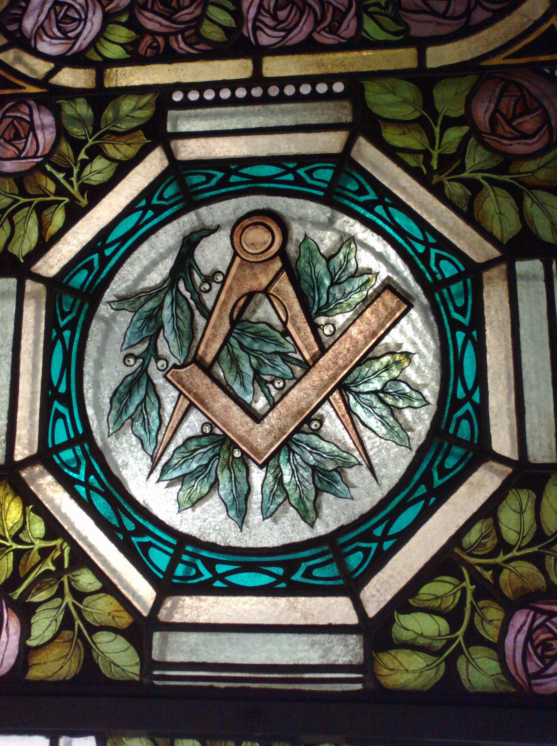 Fensterausschnitt, ehemaliges Freimaurerhaus der Loge "Zur Rose am Teutoburger Walde", Detmold, Nordrhein-Westfalen, Deutschland